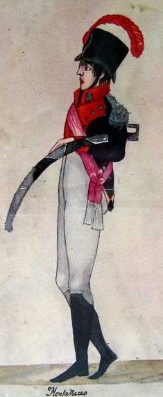 Uniforme de oficial del Tercio de Cántabros Montañeses